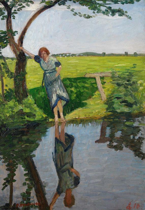 Louise Modersohn-Breling. Öl auf Pappe, signiert, datiert "8.10". 57 x 39,8 cm